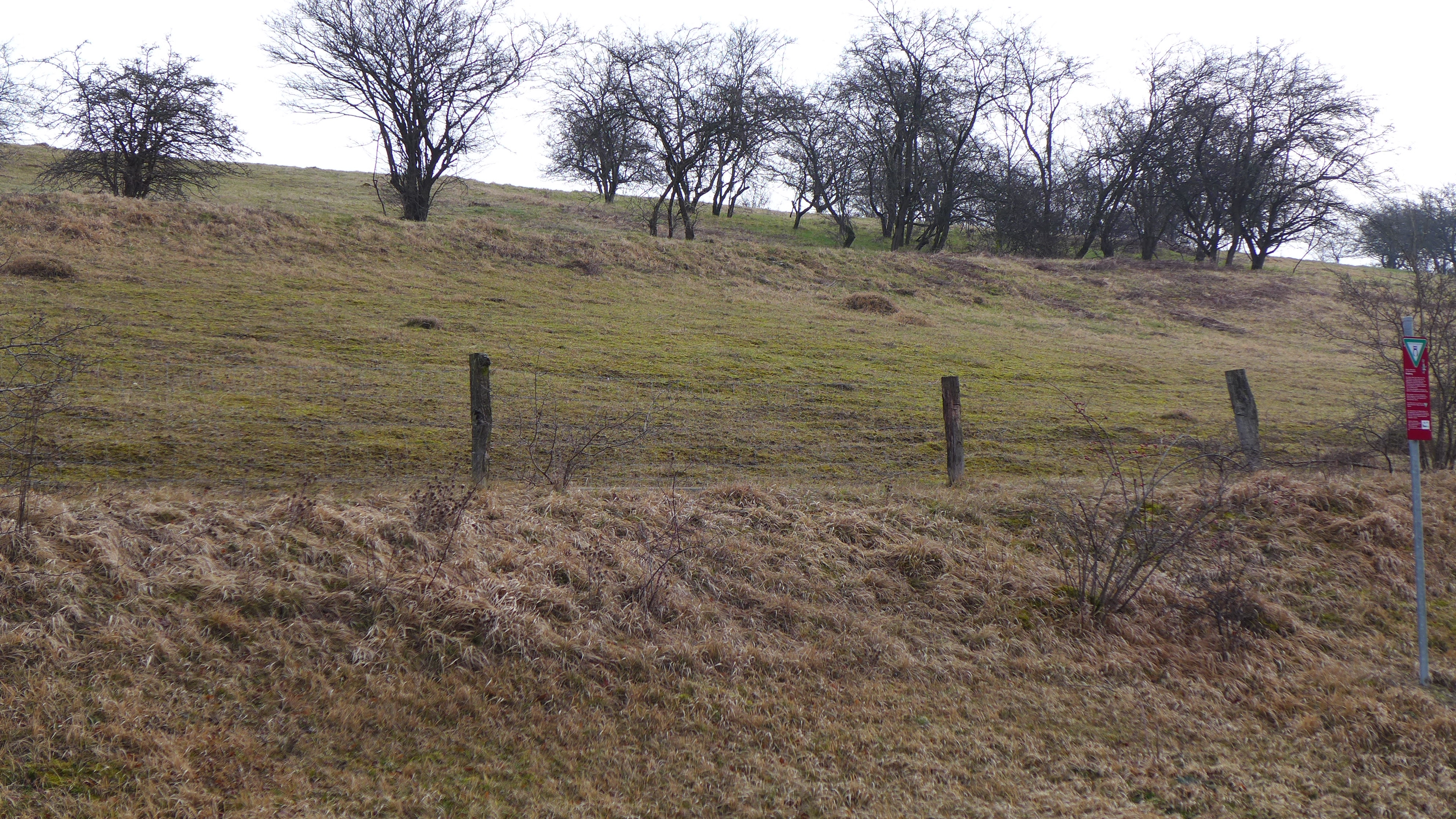 Schutzgebiet Kleyberg an der B 64